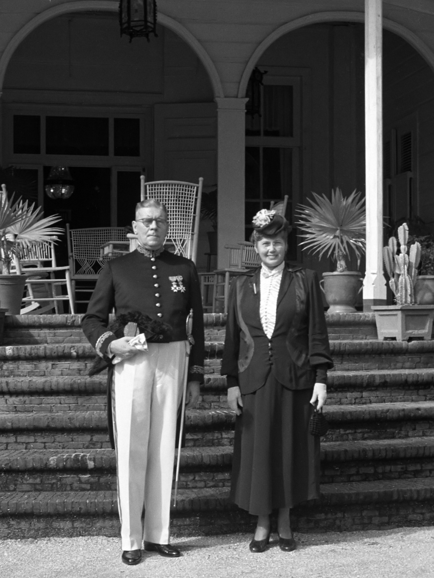 De gouverneur van Suriname Johannes Cornelis Brons en zijn vrouw voor de trappen van het Gouvernementspaleis in Paramaribo 1947